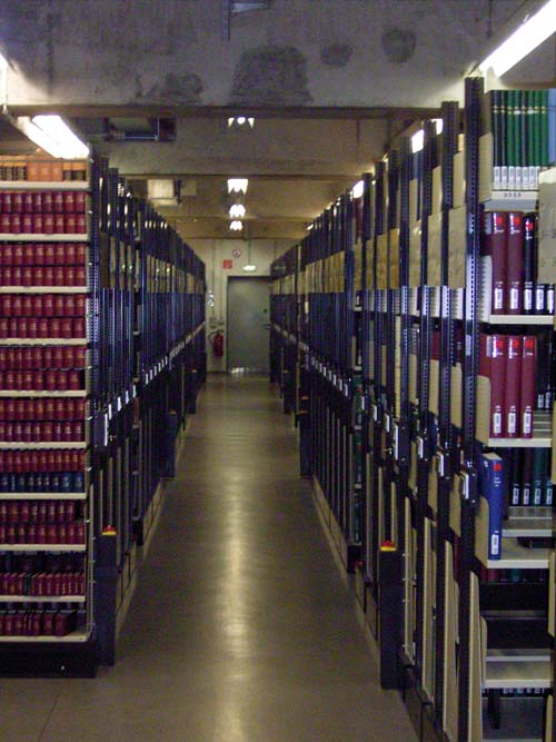 Blick in das Bibliotheksmagazin an der TU Hamburg-Harburg